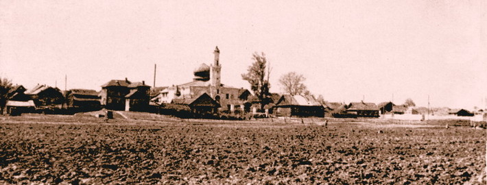 Беларуская (тарашкевіца): Менск (Miensk), Татарская Слабада (Tatarskaja Słabada)